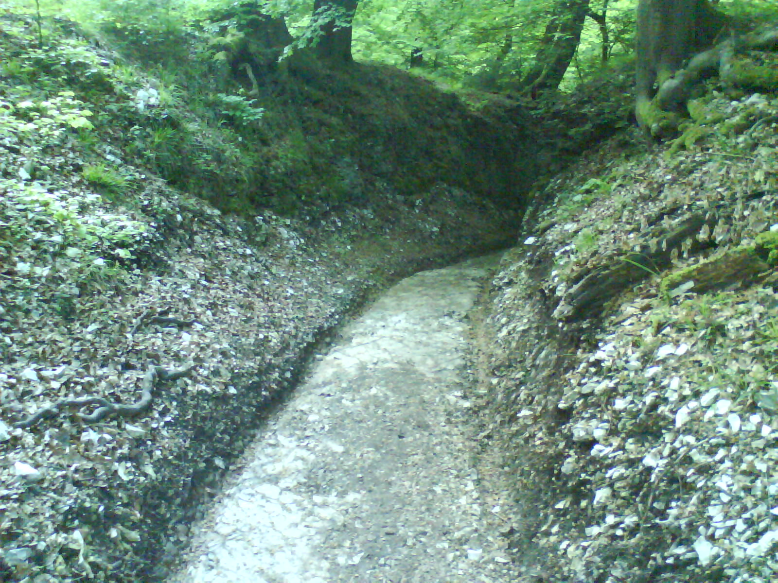 Römischer Hohlweg südlich der Externsteine. Dieser Handelsweg wurde 1813 stillgelegt. Freigelegt 2008/09 durch den Architekten Ewald Ernst.